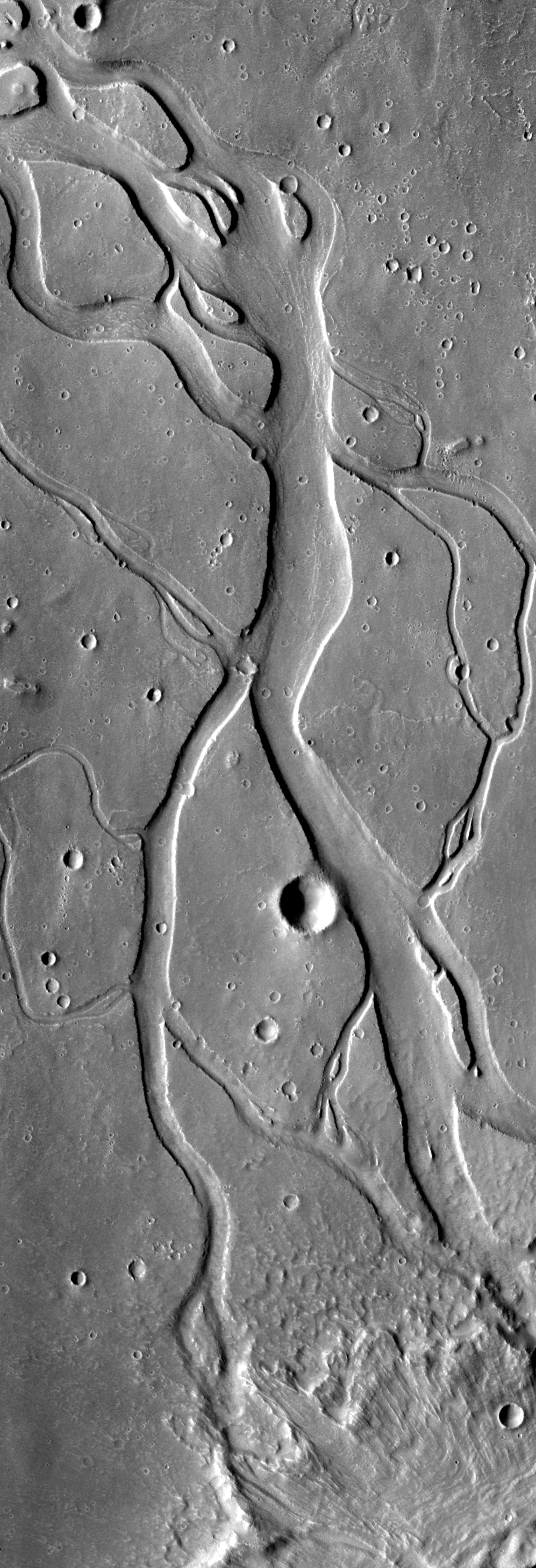 Долини Гебрус на Марсі, знята проектом THEMIS